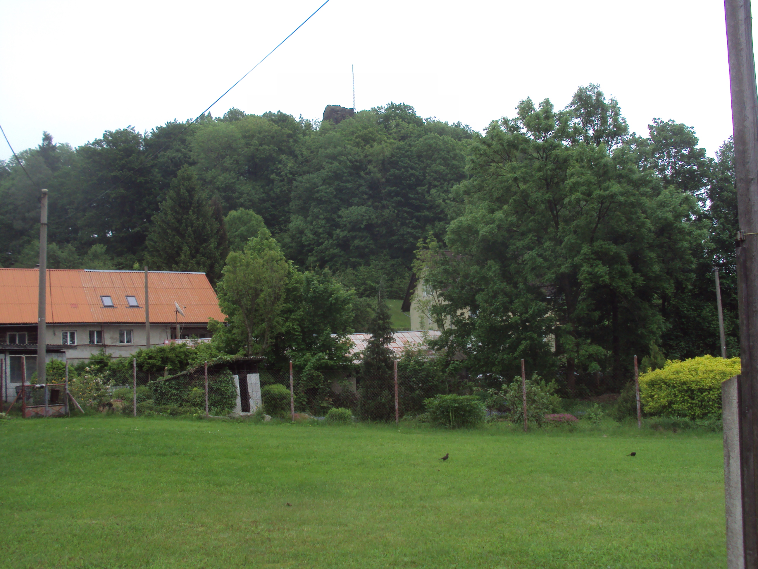 Borská skalka z ulice Gen.Svobody v Arnultovicích